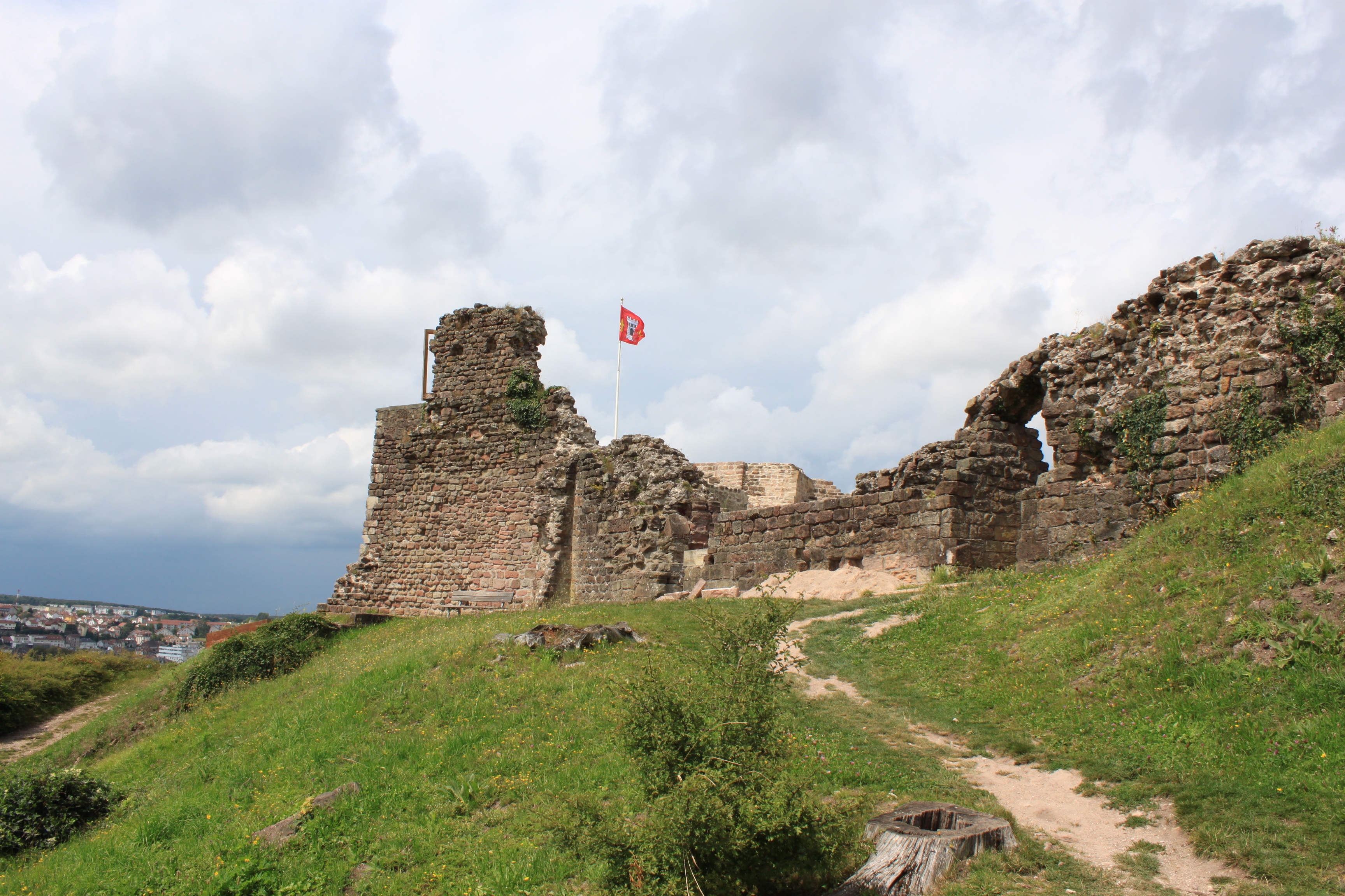 Château d'Épinal, Epinal, Vosges, Lorraine, France